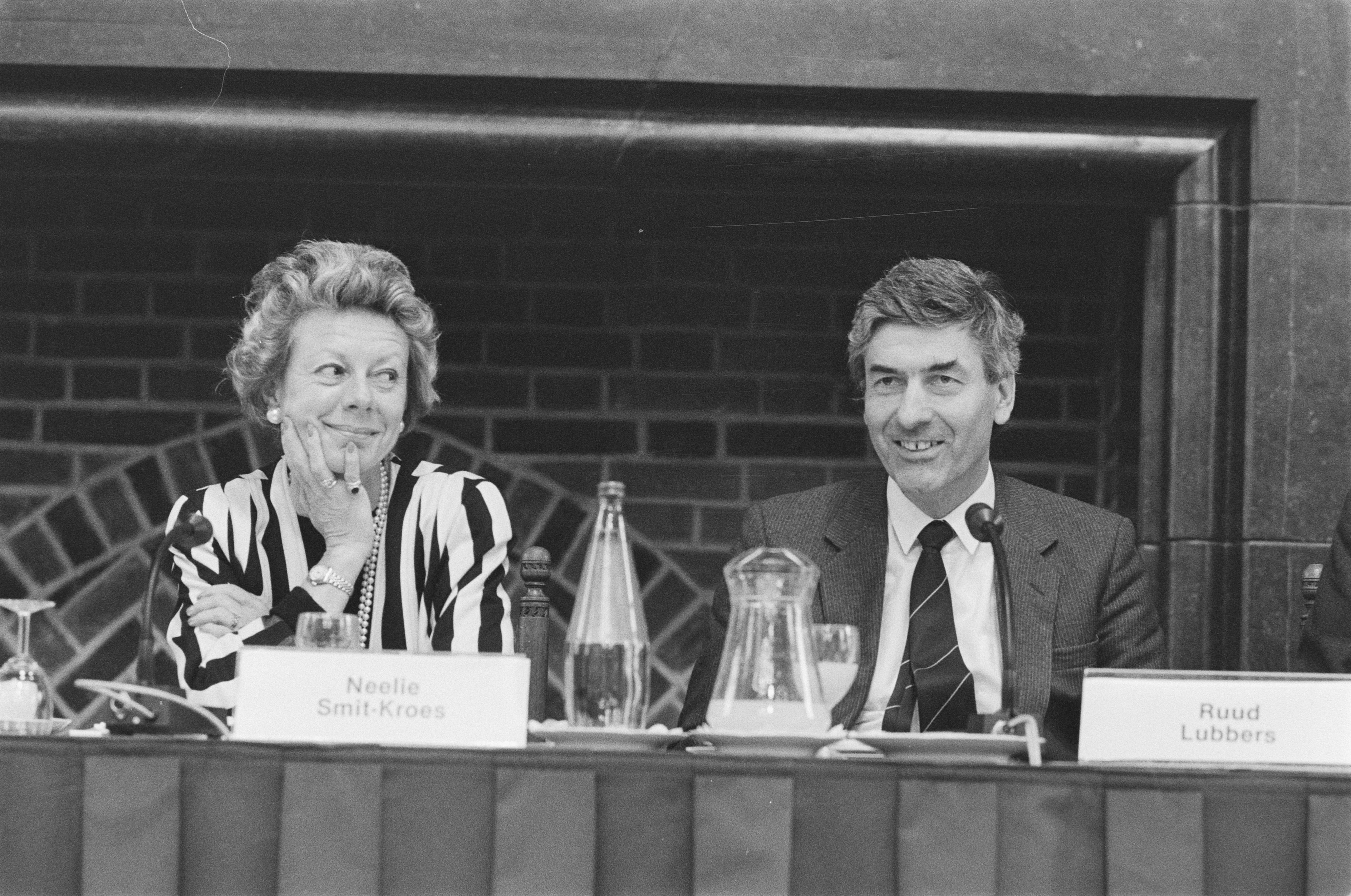 Collectie / Archief : Fotocollectie Anefo Reportage / Serie : [ onbekend ] Beschrijving : Opdracht Financieel Dagblad : "Meet the Netherlands Government"; minister Smit Kroes (l) en premier Lubbers (r) Datum : 20 mei 1987 Trefwoorden : ministers, premiers Persoonsnaam : Lubbers, Ruud, Smit-Kroes, Neelie Fotograaf : Croes, Rob C. / Anefo Auteursrechthebbende : Nationaal Archief Materiaalsoort : Negatief (zwart/wit) Nummer archiefinventaris : bekijk toegang 2.24.01.05 Bestanddeelnummer : 933-9867